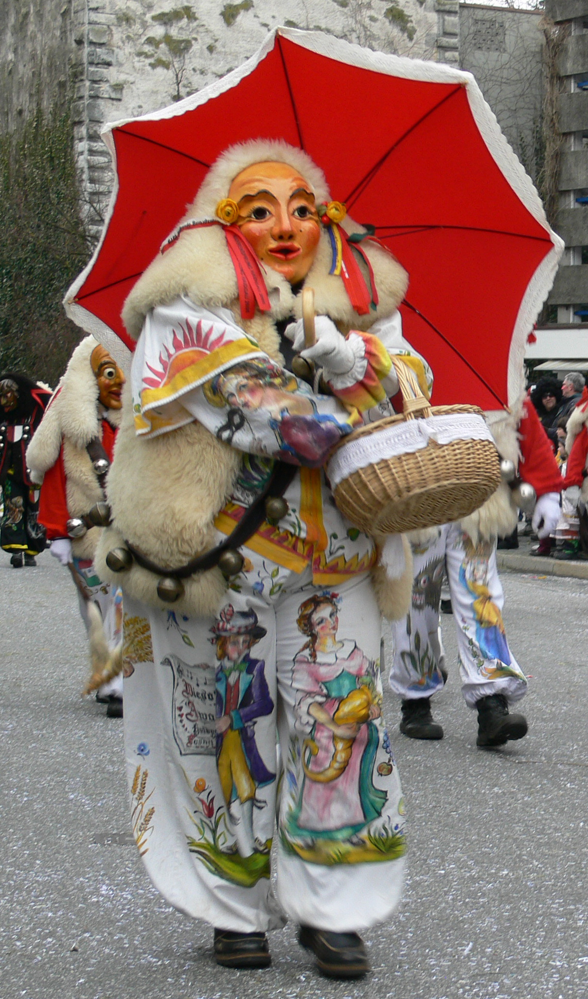 Narrensprung am Fasnetsmontag, 4. Februar 2008 in Ravensburg: Narrenfigur „Pebo“ der Narrenzunft Chadaloh, Haidgau (Bad Wurzach)